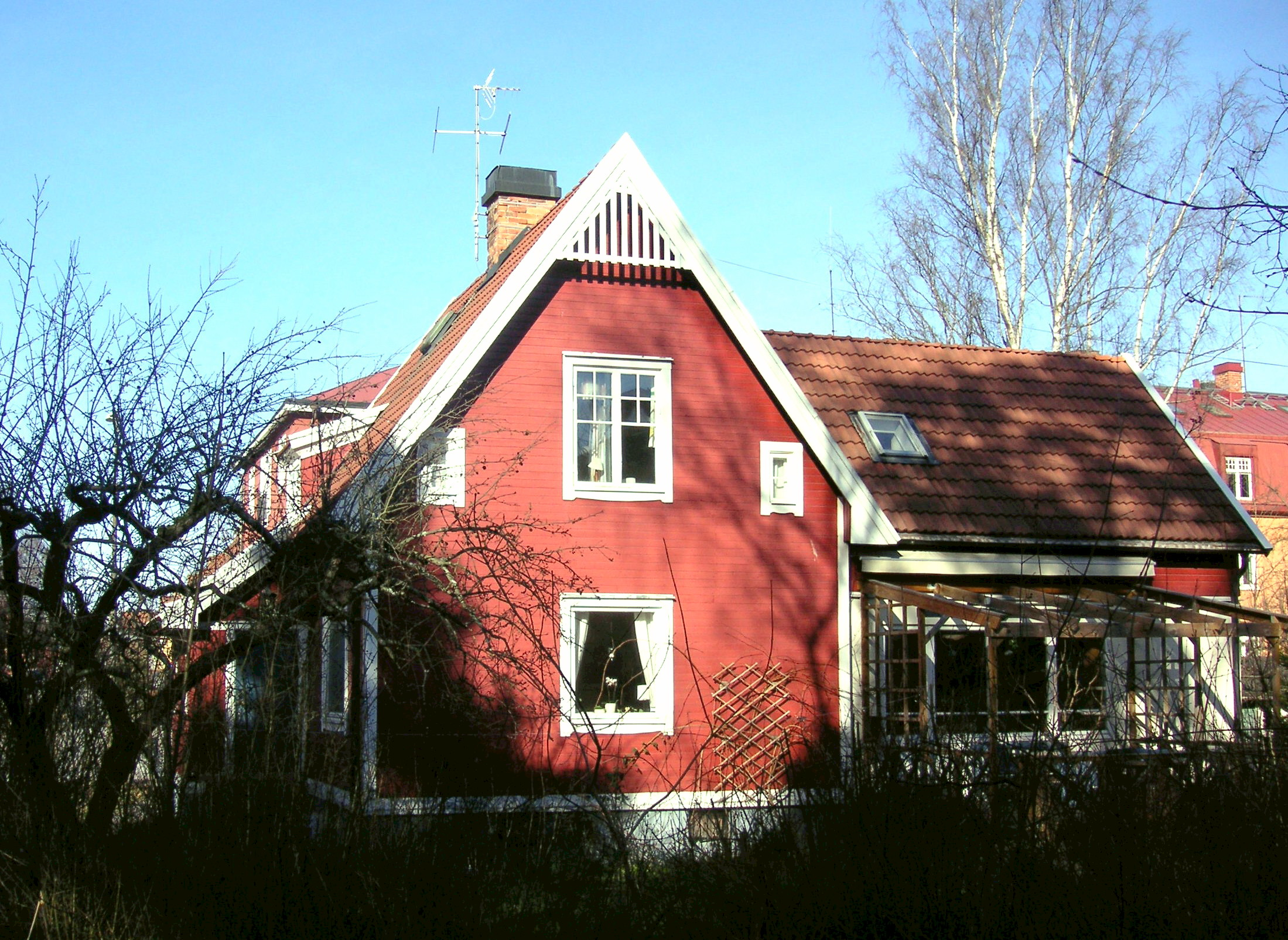 Villabebyggelse i trädgårdsstaden "Gamla Enskede", Stockhoilm